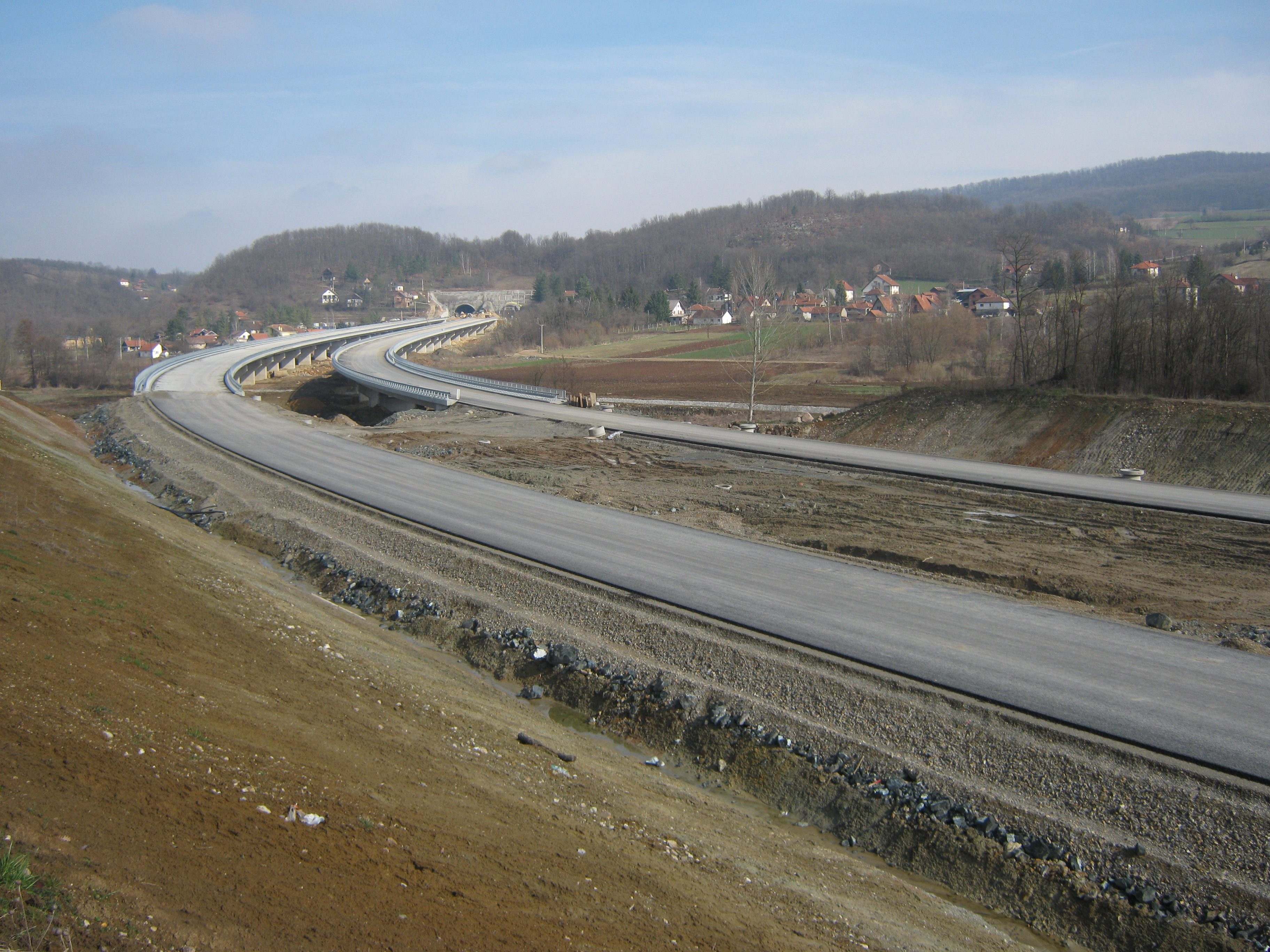 Радови на изградњи ауто-пута А2 од Београда ка граници са Црном Гором, познатом и под називом Коридор 11. Испитивање земљишта започето је 2012. године, а радови на изградњи почели су 2013. године.